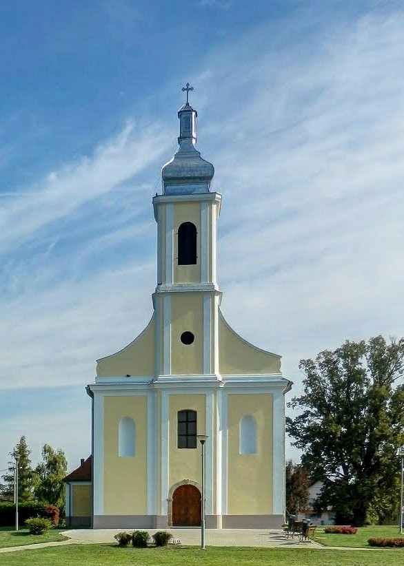 Baranyavár, katolikus templom